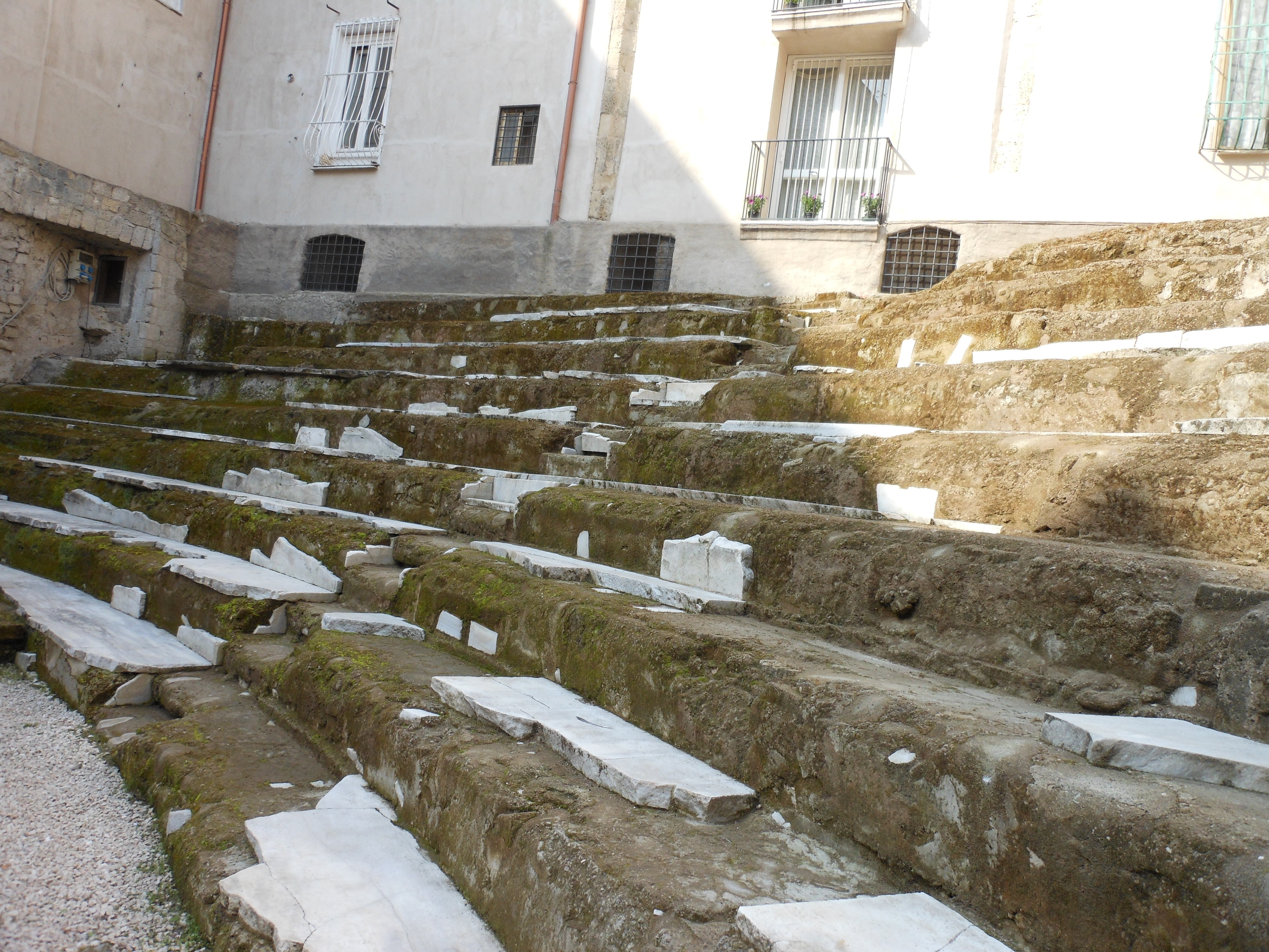 Cavea del teatro romano di Neapolis, detto anche dell'Anticaglia